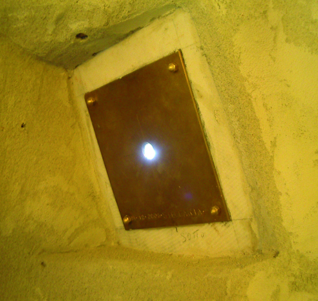 Piastra col foro gnomonico, vista dall'interno della chiesa